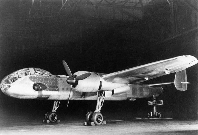 Junkers Ju 288 V 1, Kampfflugzeug Werkfoto Junkers 288/1